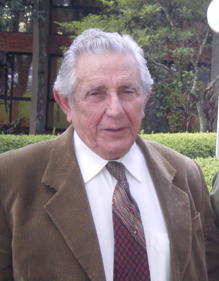 é um engenheiro eletrônico e pesquisador brasileiro, que dirigiu o Instituto Nacional de Pesquisas Espaciais (INPE)